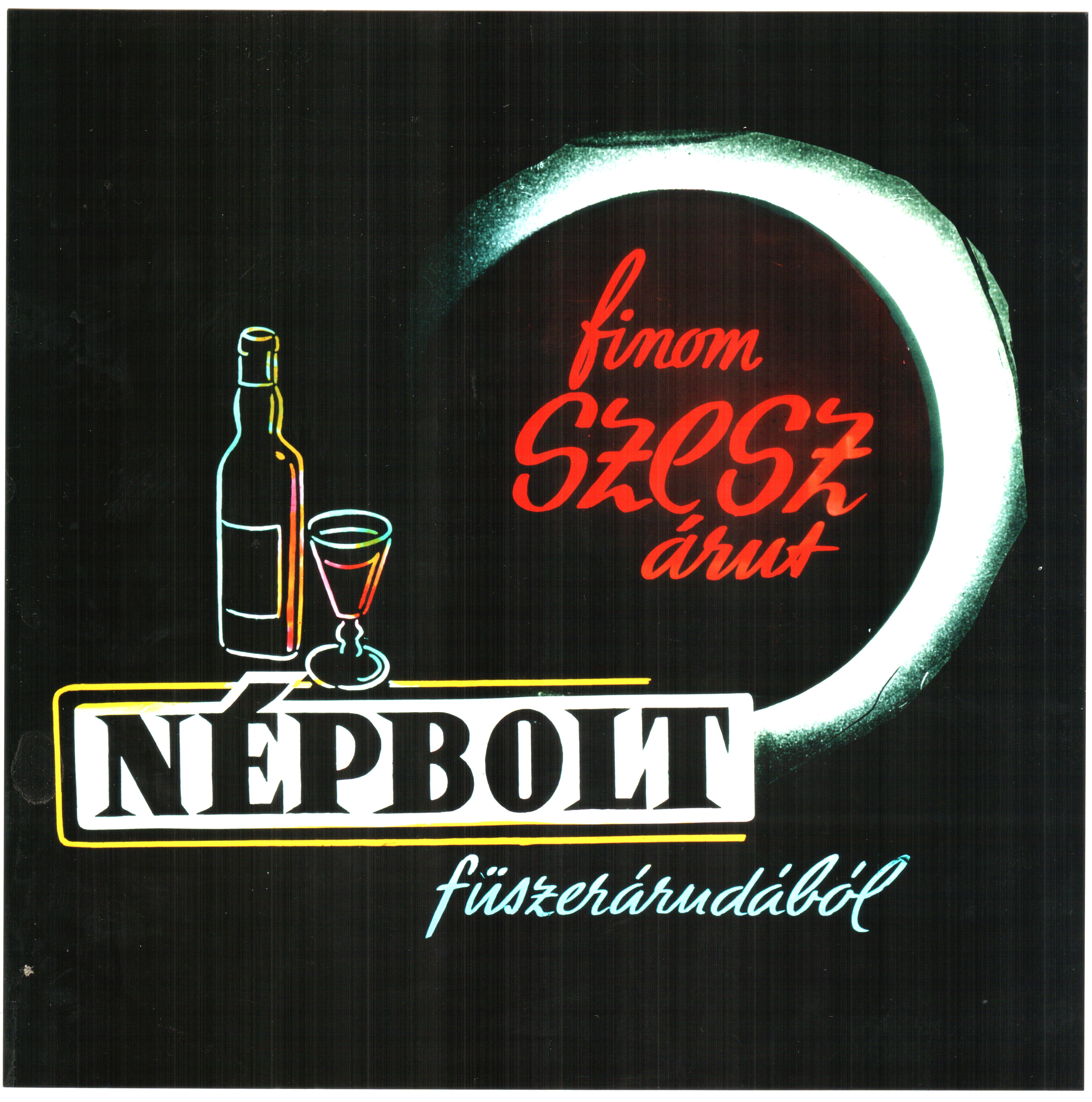 A 6,5 cm x 6,5 cm méretű, egymáshoz ragasztott, valószínűleg kézzel vágott üveglapok közé tett - a vaterán vásárolt - diapozitívről készített 20 cm x 20 cm-es színes papírképet (hátoldalán ex-libris) 2012. szeptember 25 –én szkenneltem.